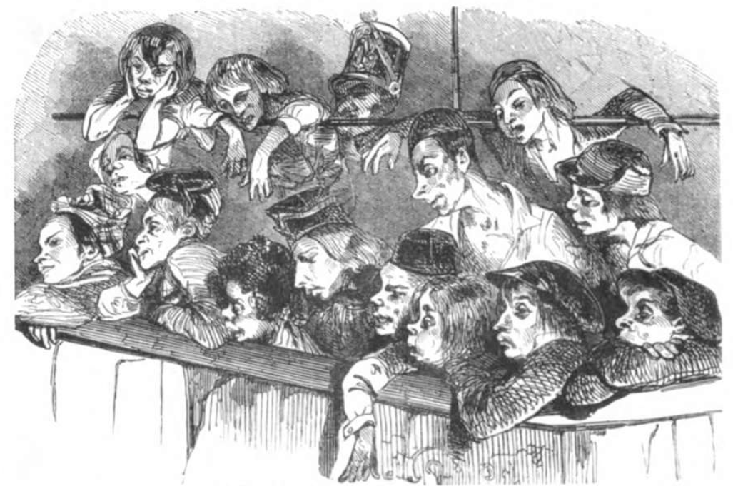 Das Paradies im Theatre des Funambules